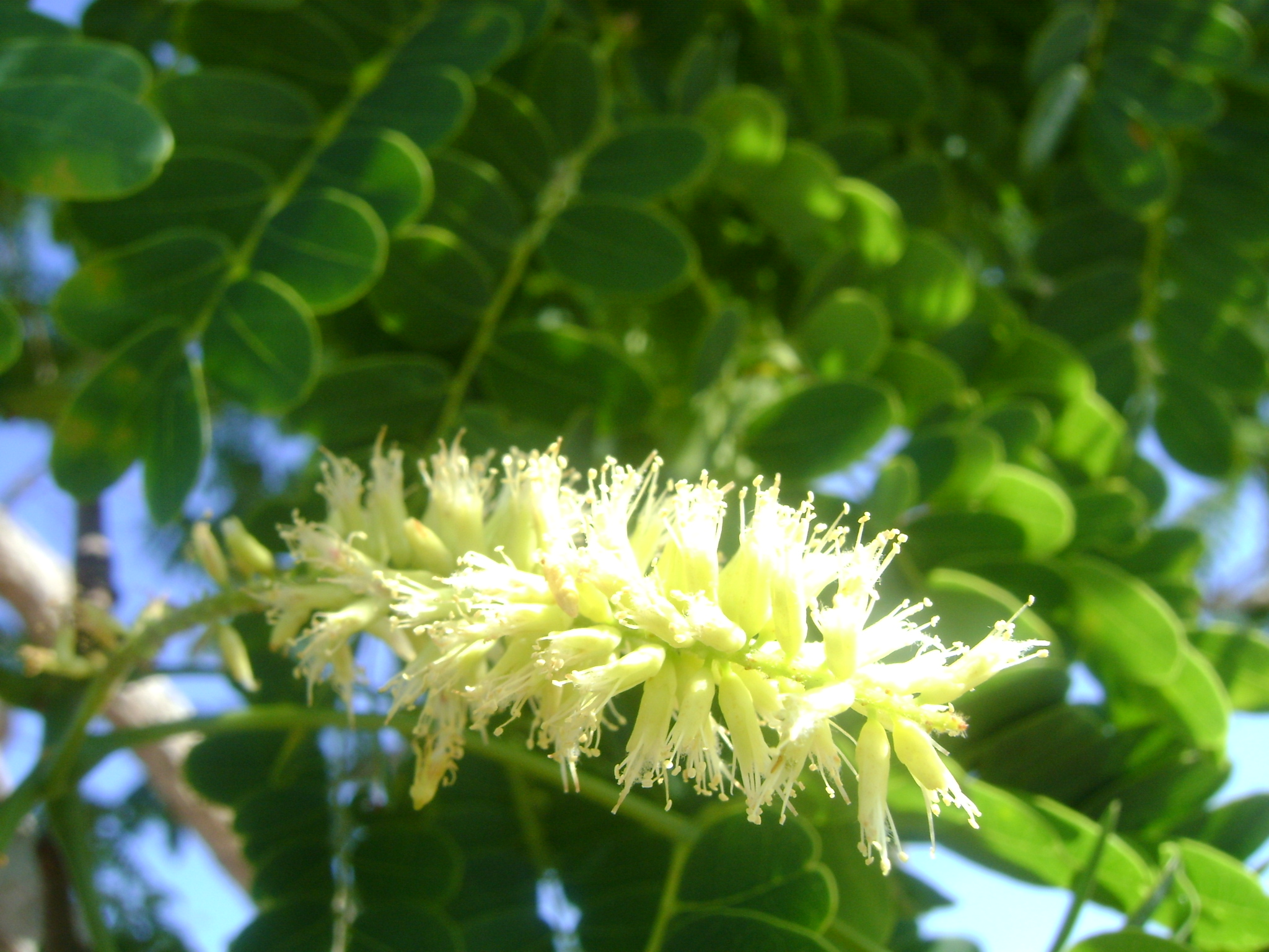 Floro de Plathymenia reticulata, en Brazilo.